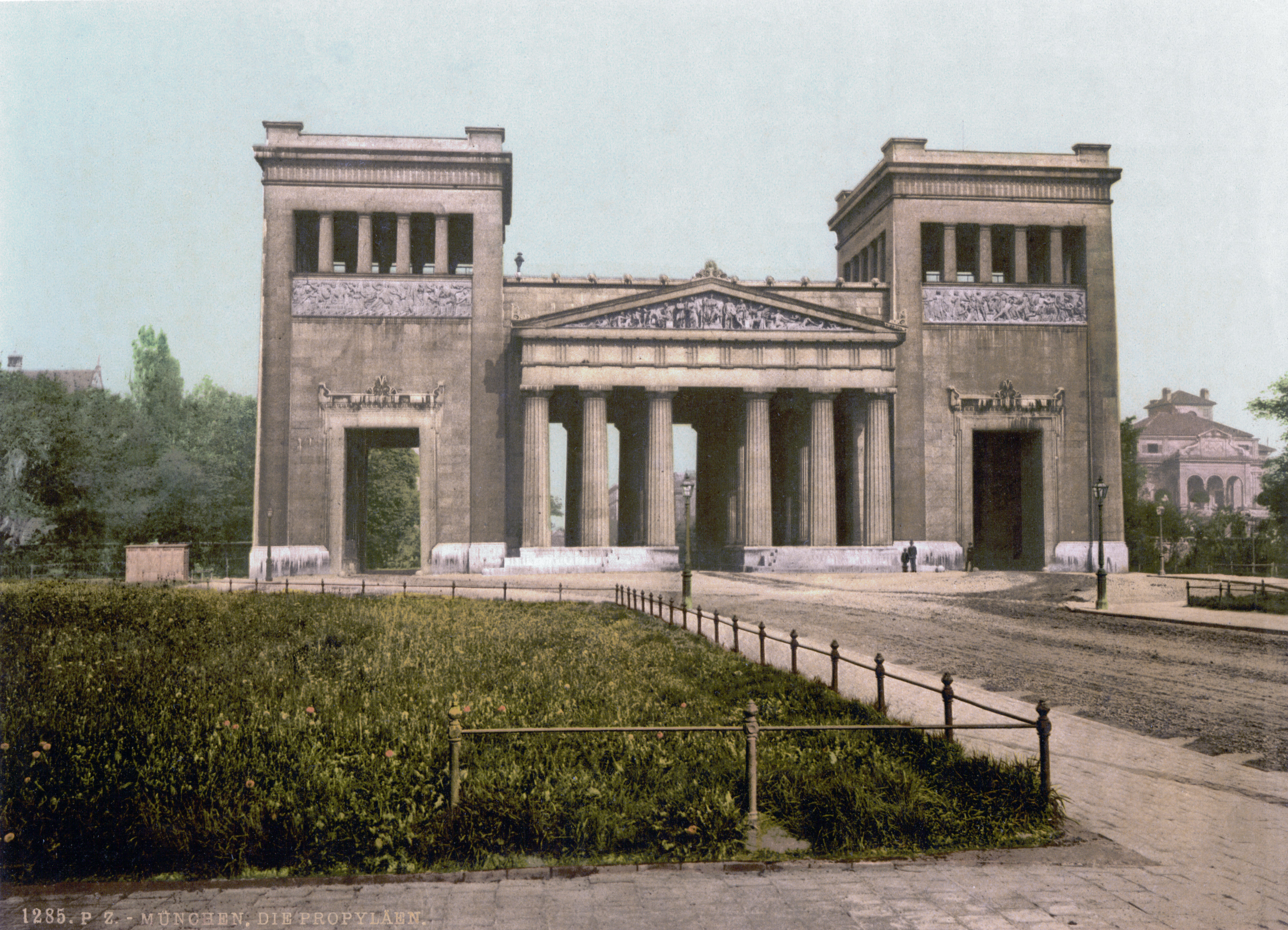 Propyläen München